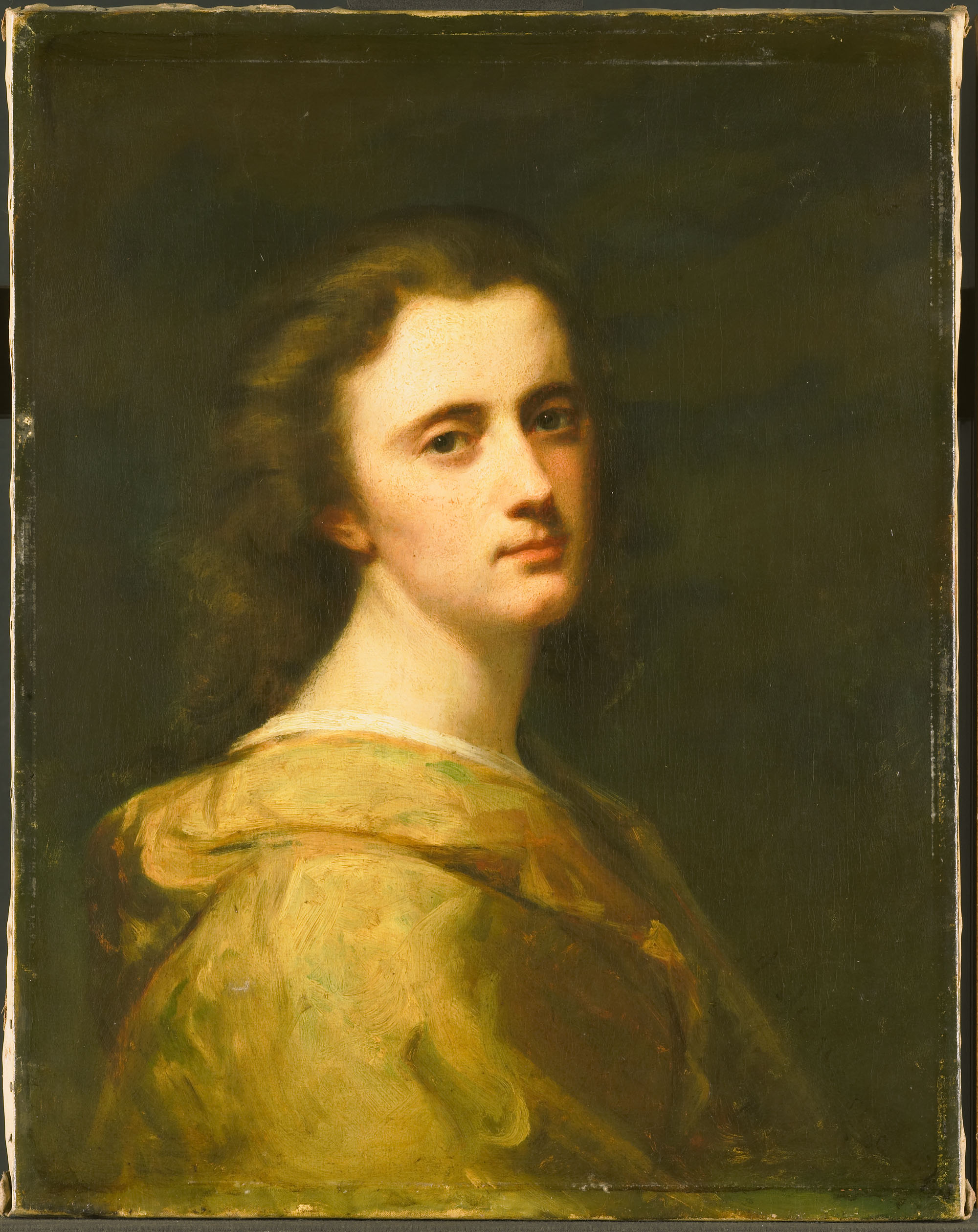 Thérèse Schwartze geschilderd door haar vader Johann Georg Schwartze [1]